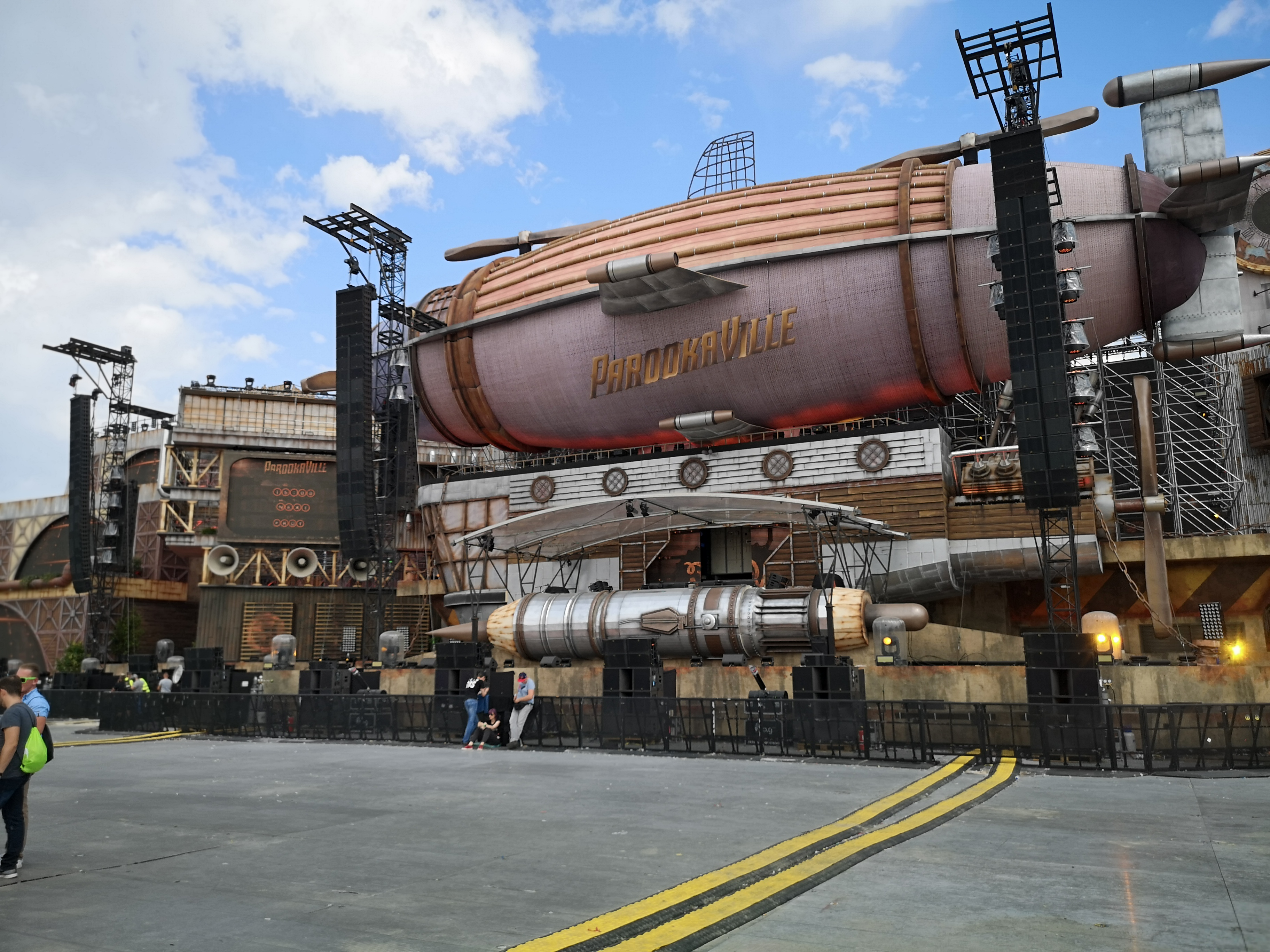 Parookaville Mainstage 2019 at Germany